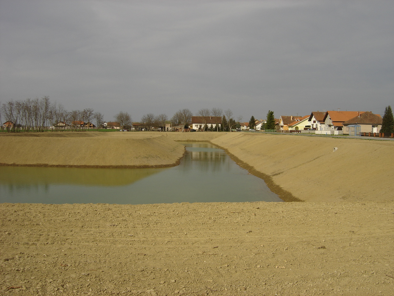 Jezero (Petlovac), Petlovac (Baranja)